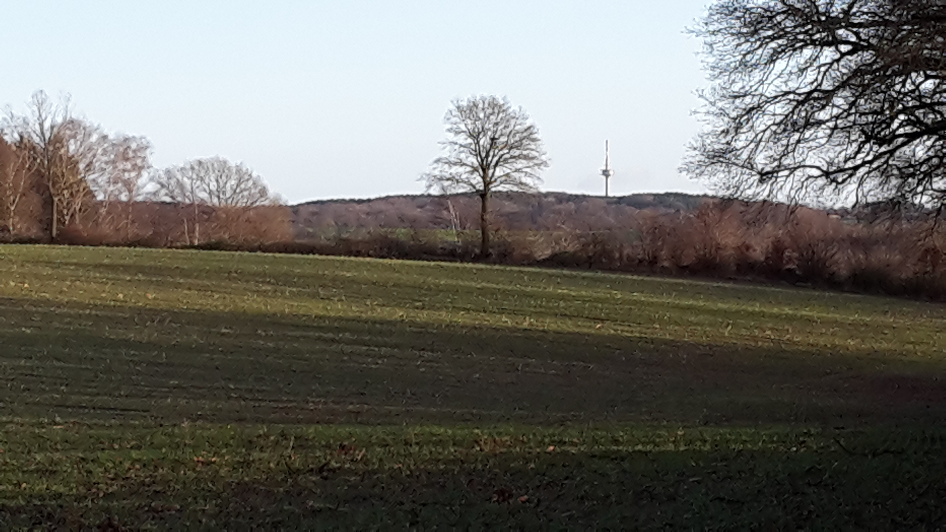 Feldmeldeturm Hennstedt von Grauel aus gesehen